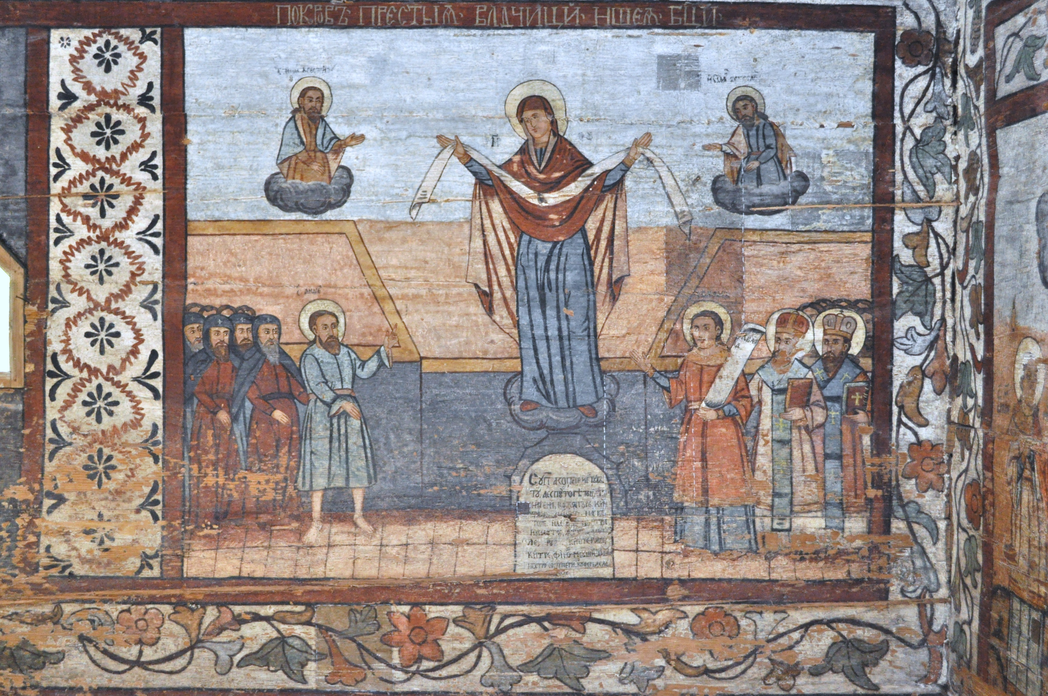 Biserica de lemn "Sfântul Nicolae", sat BOGDAN VODĂ